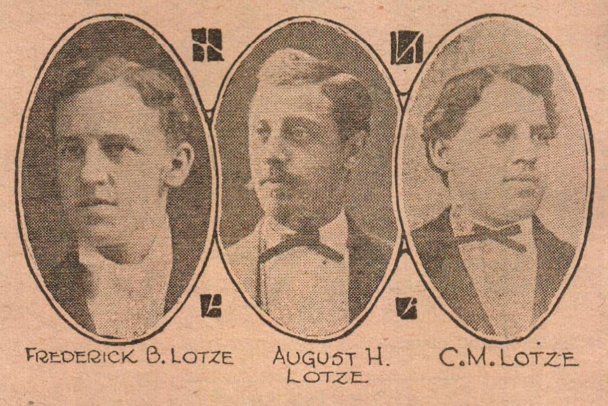 Fotos von Frederick B., August H., C.M. Lotze